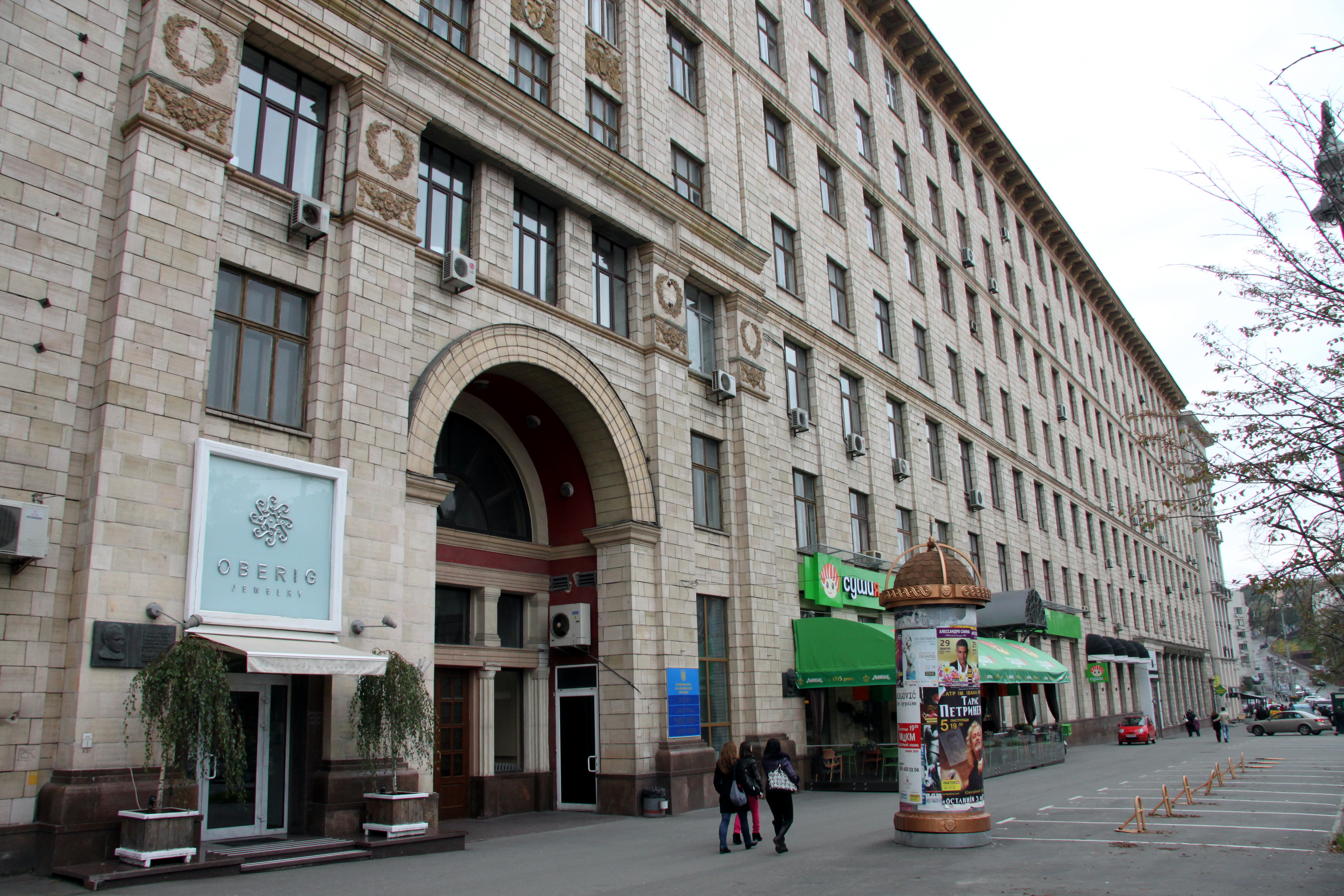 Будинок Секції суспільних наук НАН України, де у 1960–1981 рр. працювали вчені-академіки: І. К. Білодід, мовознавець, В. М. Корецький, юрист; Б. М. Бабій, правознавець; історики: І. О. Гуржій, Ю. Ю. Кондуфор, А. Д. Скаба, М. І. Супруненко та ін., Київ, Грушевського Михайла вул., 4